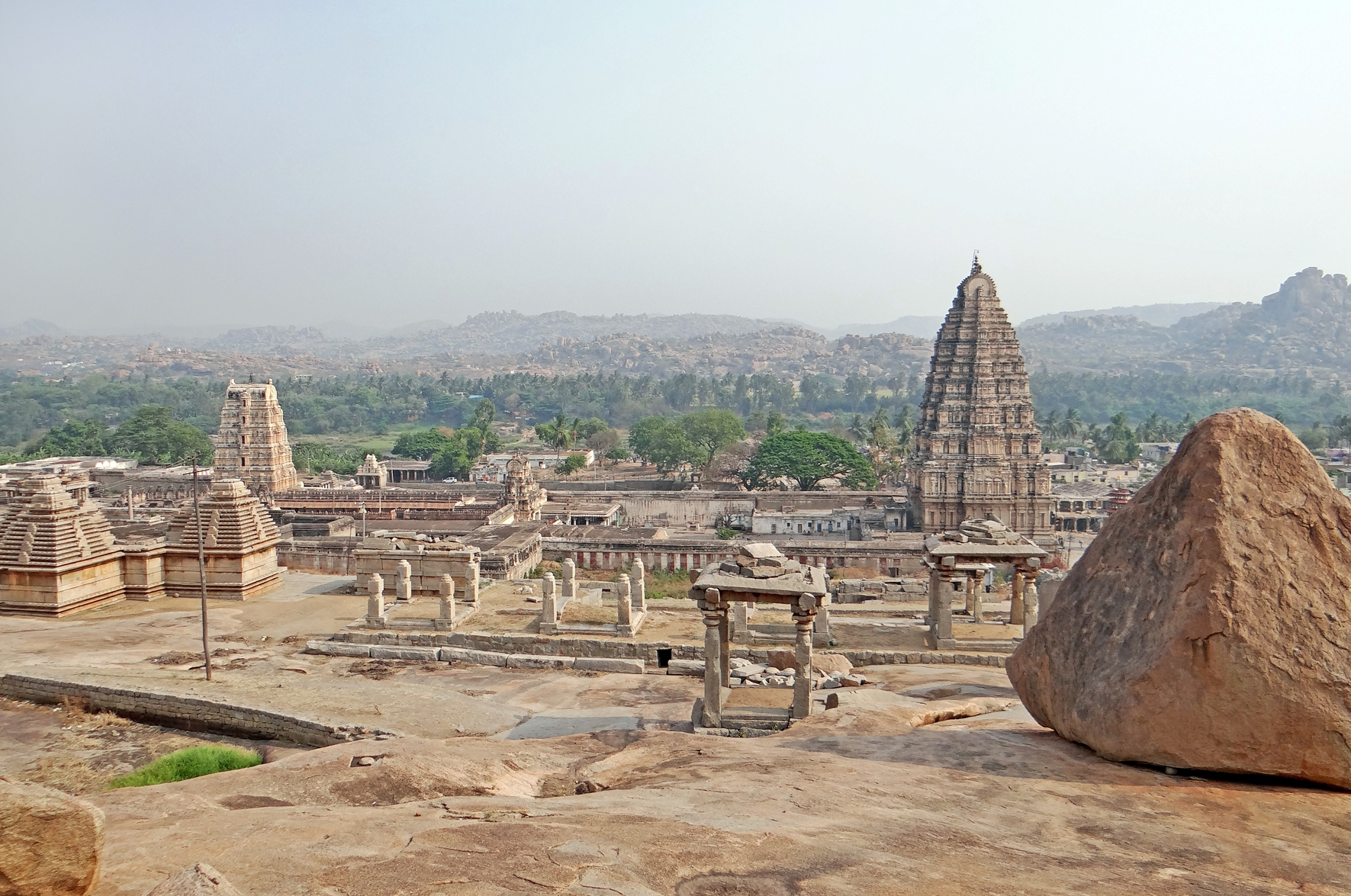 Le complexe du temple de Virupaksha vu depuis la colline de Hematuka à Hampi (Vijayanagar) Le temple de Virupaksha est le plus ancien et le plus important de Hampi. C'est un centre de pèlerinage pour les dévôts de Shiva. Le premier sanctuaire a été créé sur ce site au VIIè siècle. Le temple est situé sur la rive sud de la rivière Tungabadra, dans la ville sacrée. Le gopuram d'entrée est à droite sur la photo. L'ouverture d'un temple est toujours orientée à l'est. Le gopuram plus petit qui est à gauche sur la photo mène au bassin sacré. A gauche, les petits temples à toiture pyramidale à degrés sont des temples dédiés à Shiva, ils sont construits dans le style Trikutachala. Ils sont souvent pris par erreur pour des temples jaïns. Ils appartiennent aux temples de la colline de Hemakuta. Site officiel